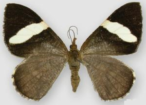 Hagnagora unnia